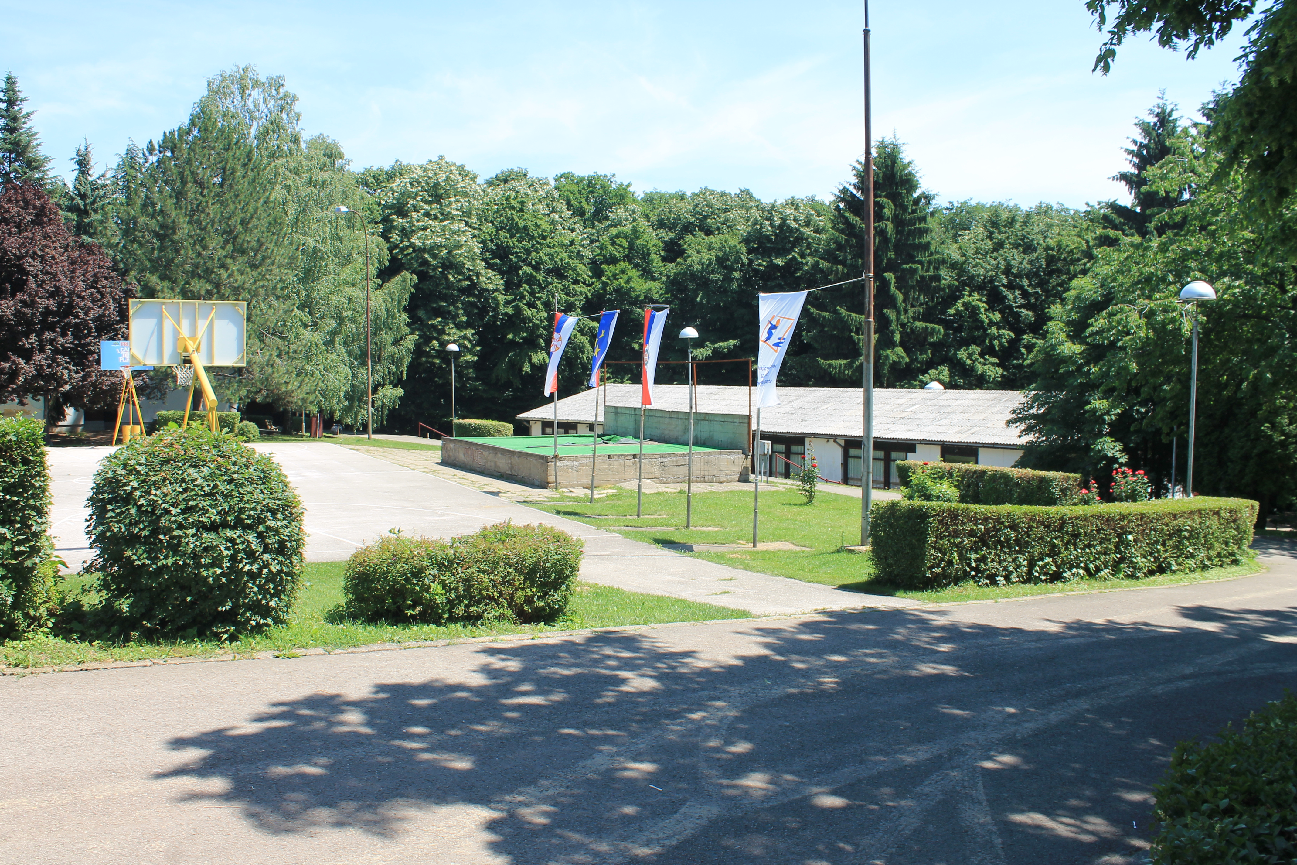 Izletište Letenka